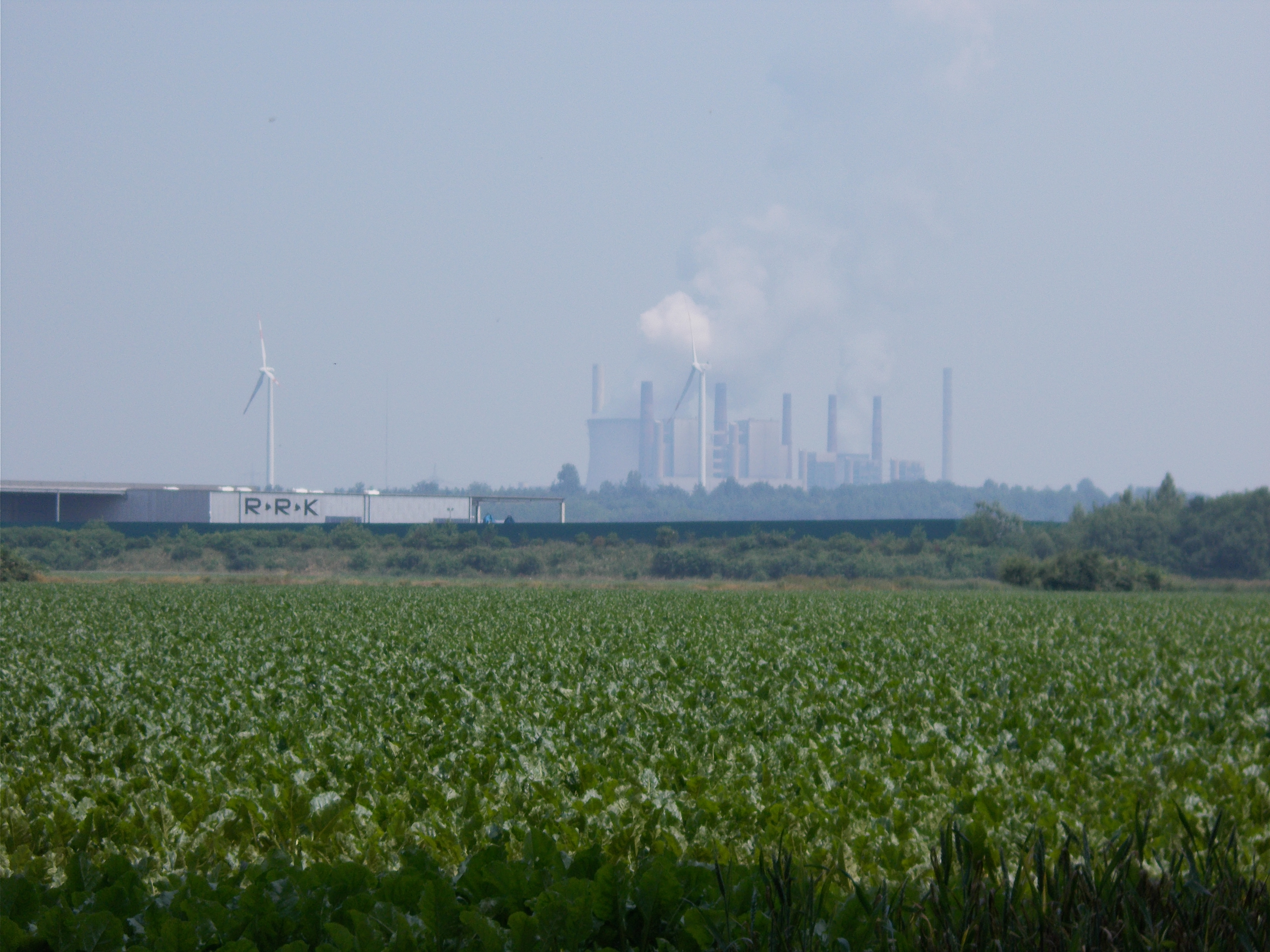 Feld mit Aussicht auf das Kohlekraftwerk Neurath bei Neuss.